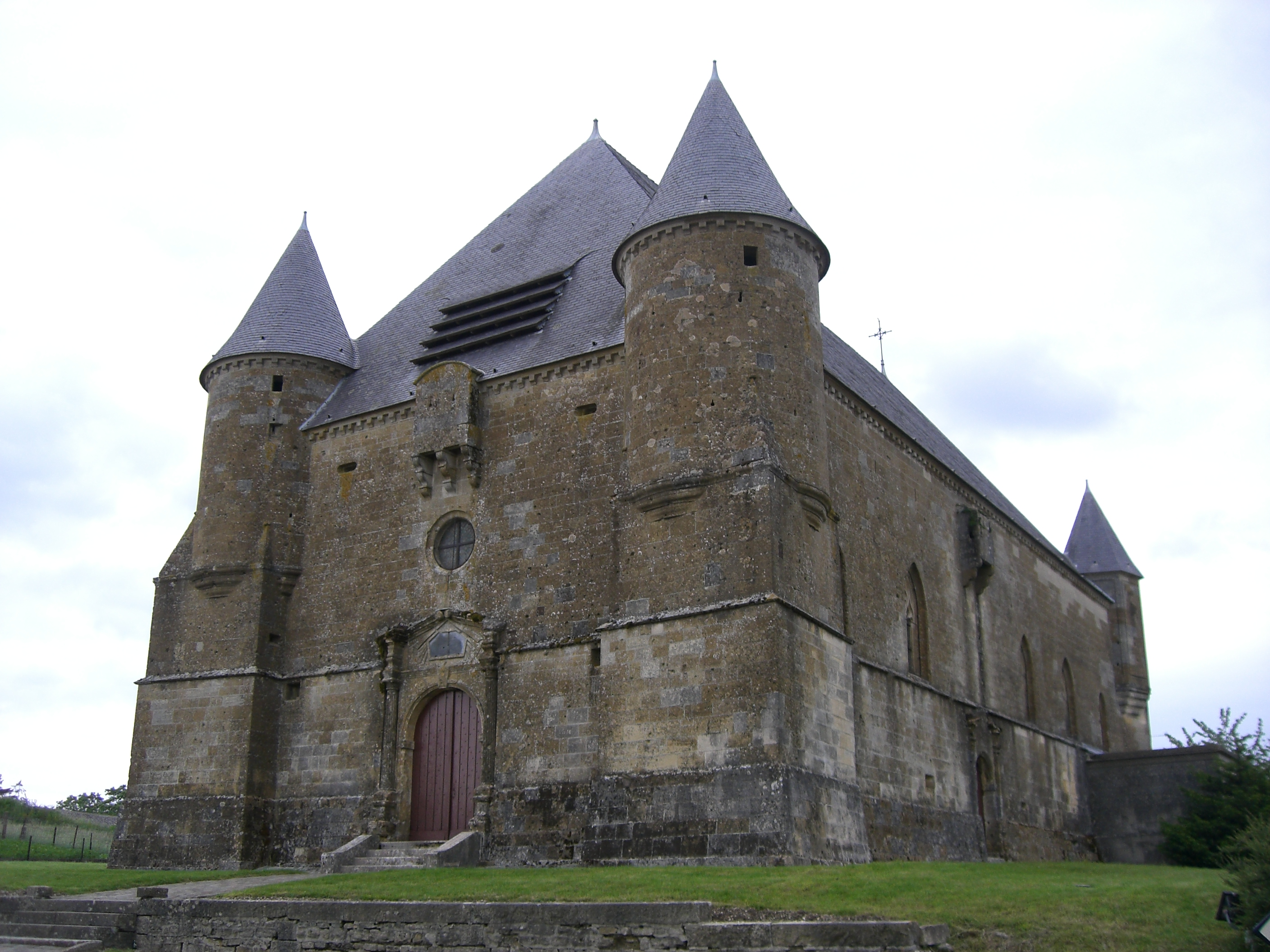 Eglise de Saint-Juvin (Ardennes, France)